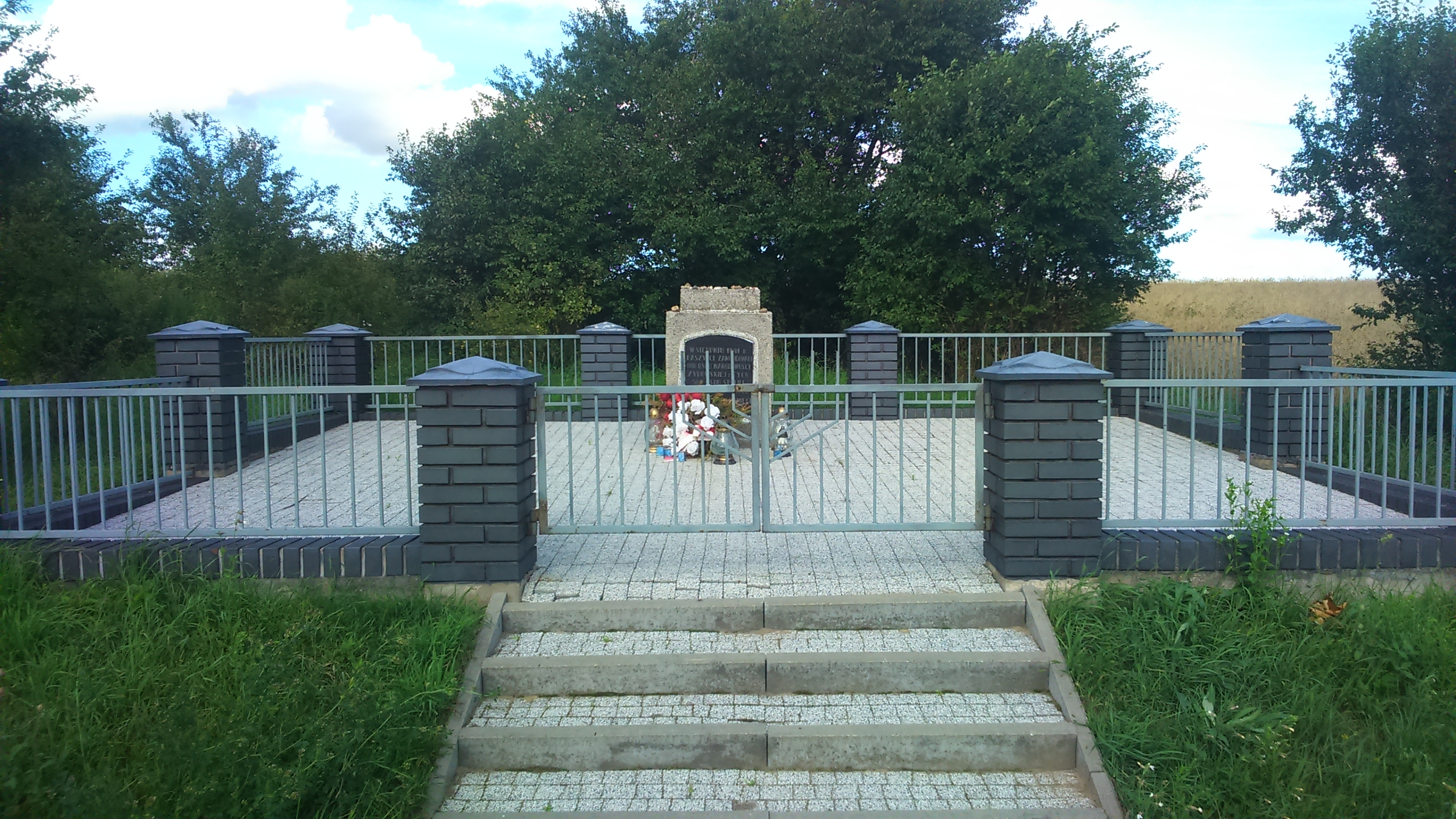 Radziłów, cmentarz - mogiła ludności żydowskiej z 1941